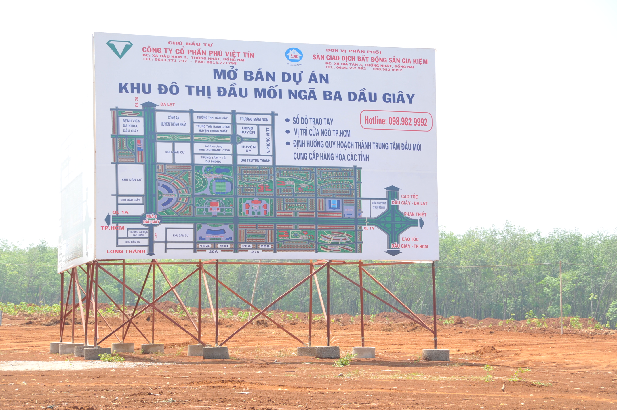 Du an do thi dau moi Dau Giay